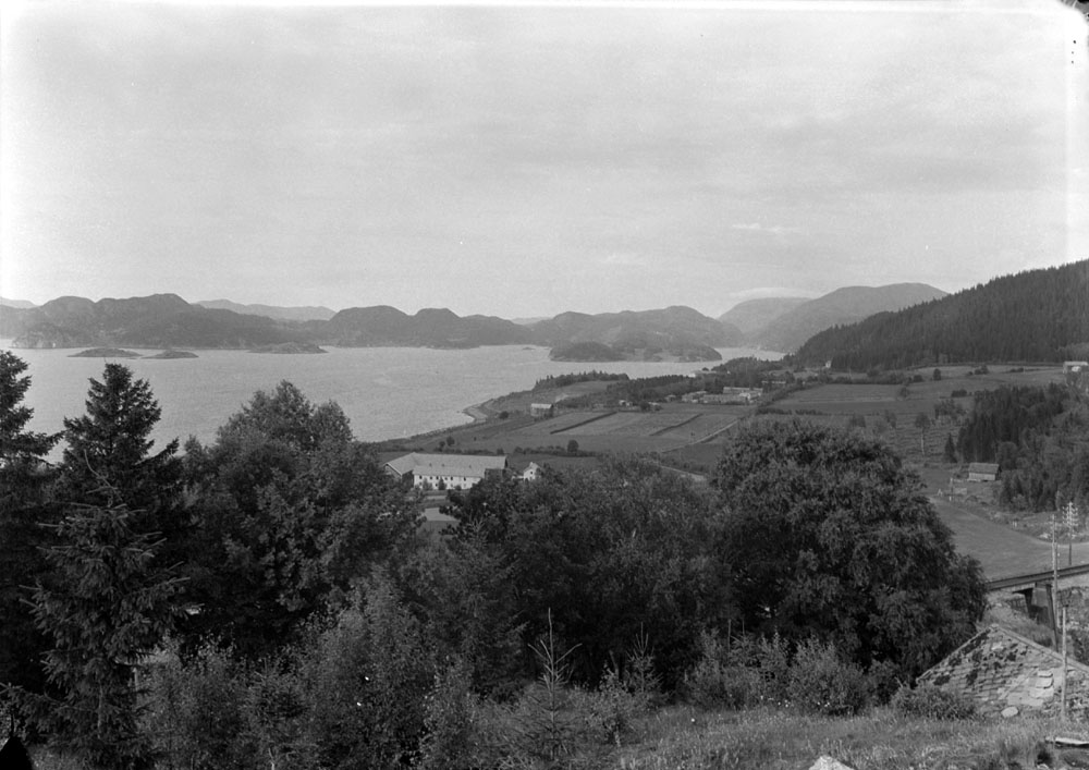 Grenda Hammer på Skatval i Stjørdal kommune, sett fra Solhaugen. Datert til 1947.